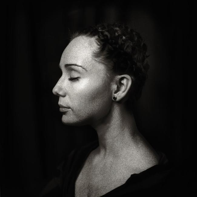 Чулпан Хаматова. Алексей Никишин.2008